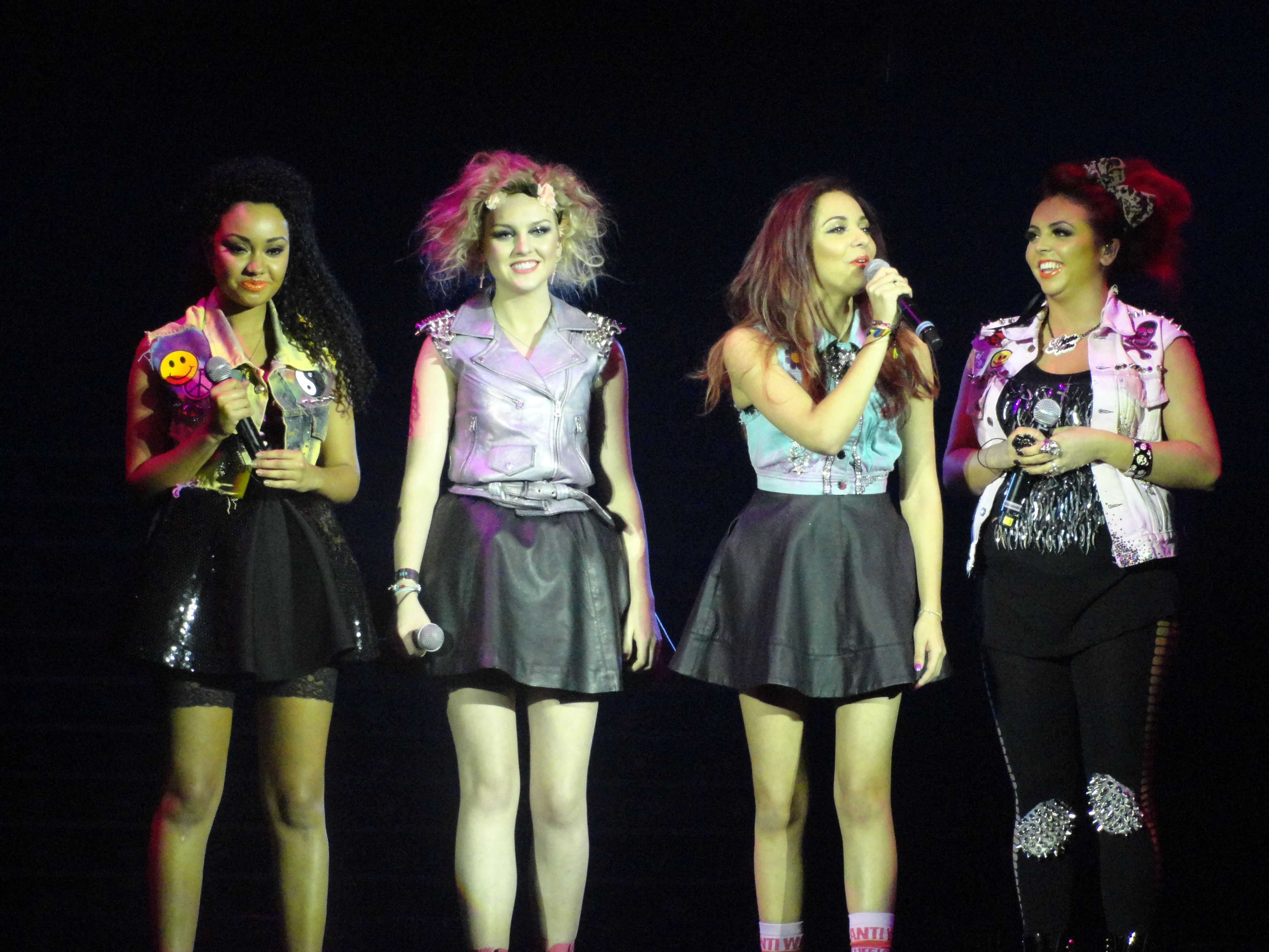 Little Mix